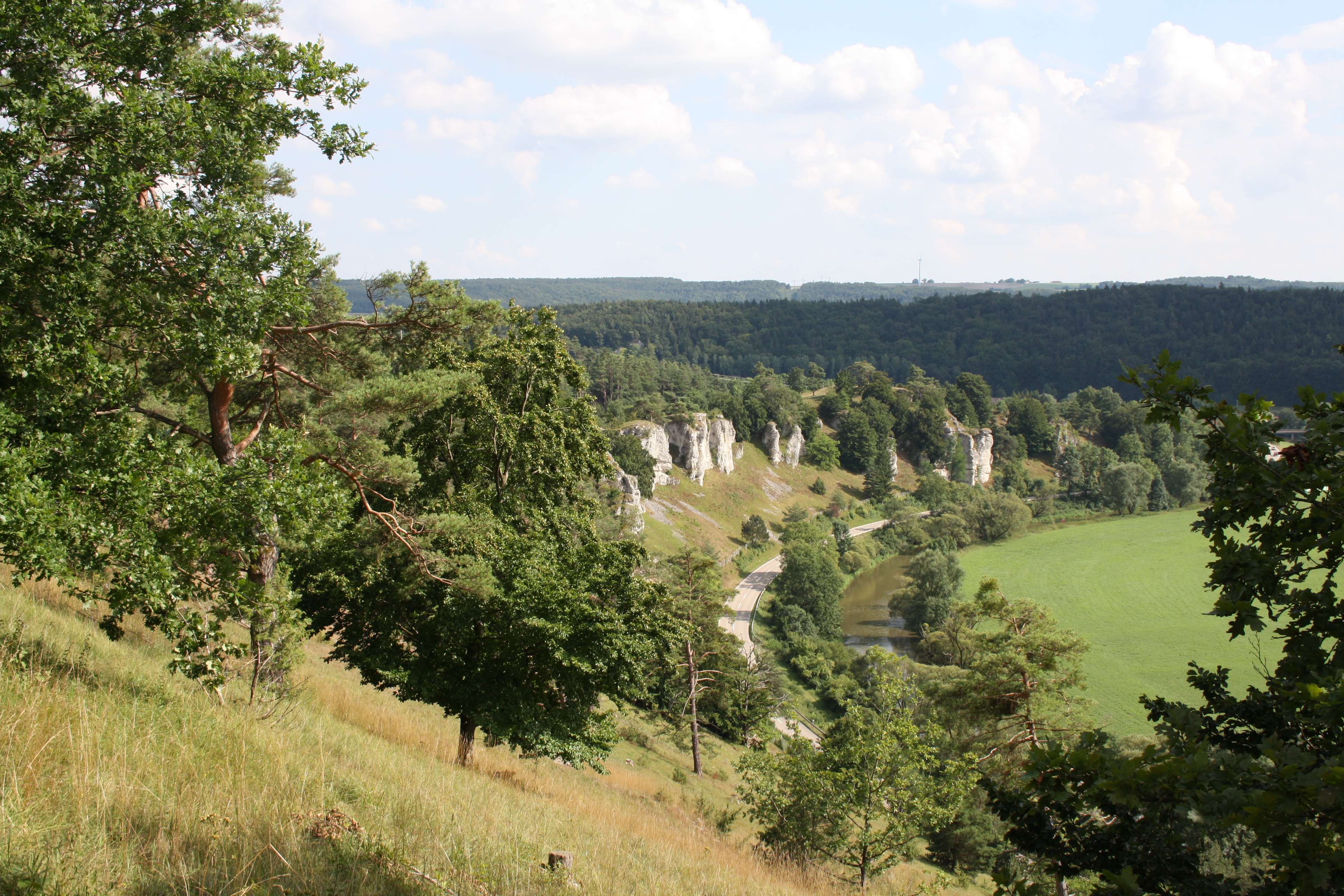 Juratrockenhang mit Felsengruppe 12 Apostel im Naturpark Altmühltal, Geotop 577R008, Bayern